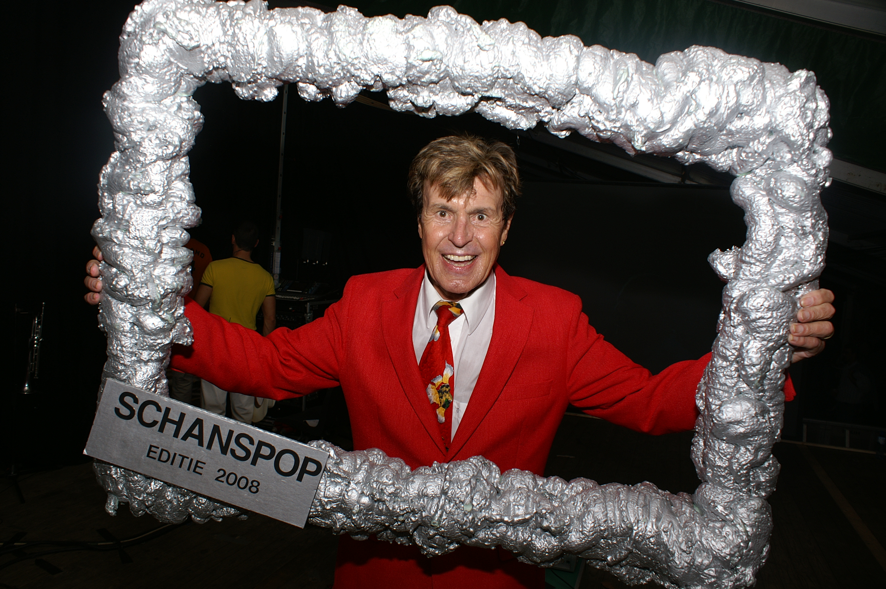 Freddy Breck